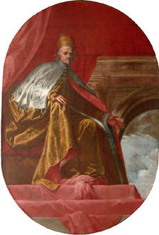 Francesco Cornaer (Doge) (1585-1656)